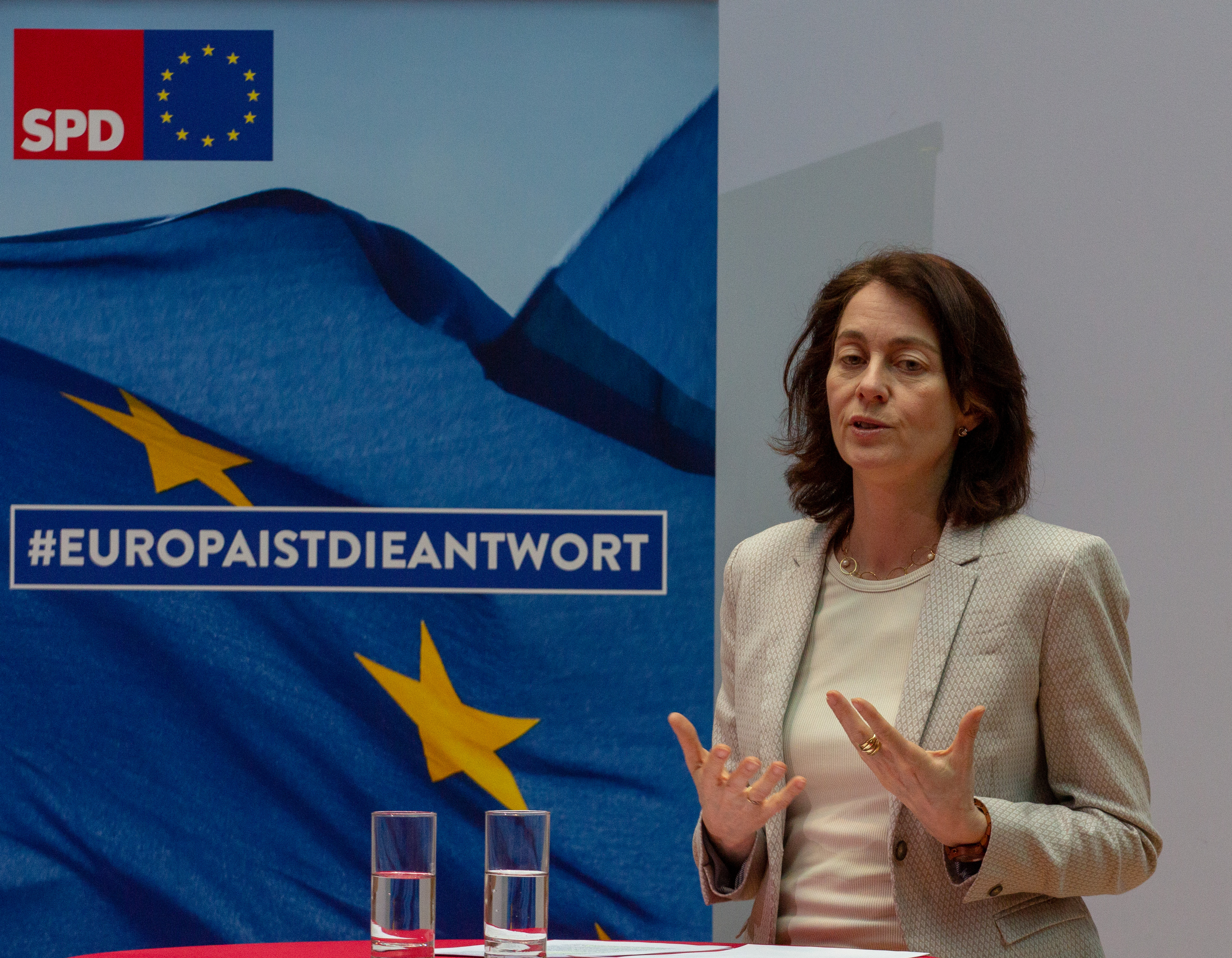 Katarina Barley beim Wissenschaftsforum der SPD am 12. April 2019 in Berlin.